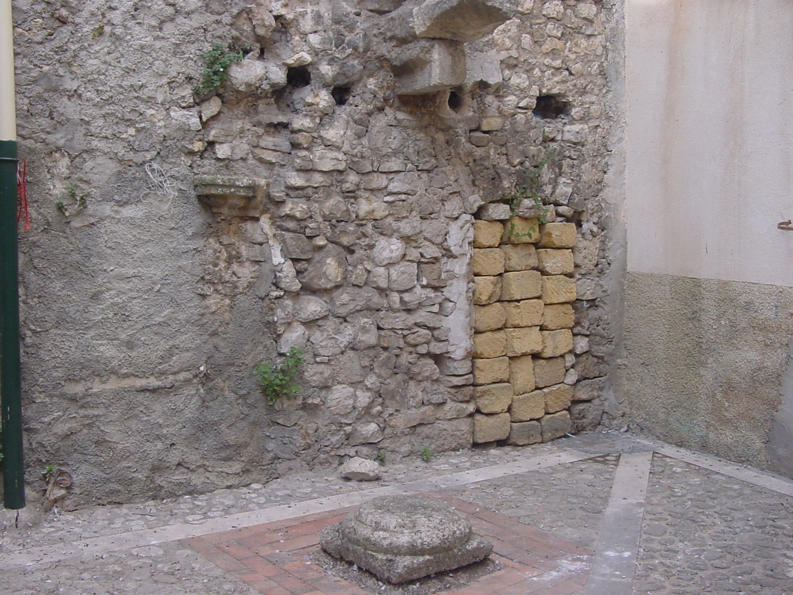 Bivona, vicolo Canzeri